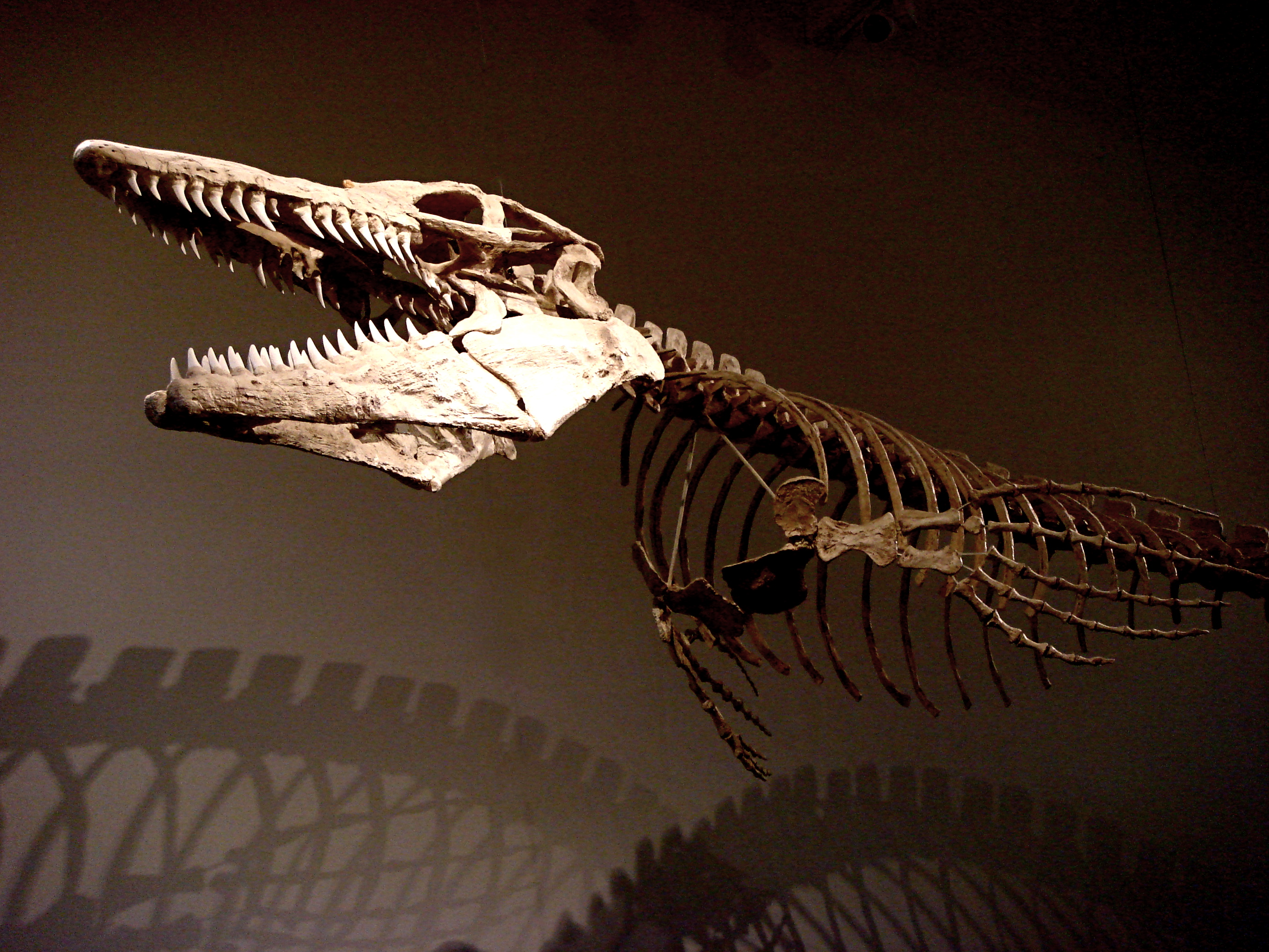 "Bunker" Tylosaurus proriger skeleton. Nature's Art, Montville, CT.